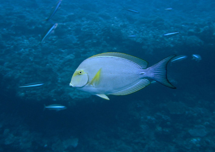 Chirurgien à masque jaune (Acanthurus xanthopterus au milieu d'un banc de labres.